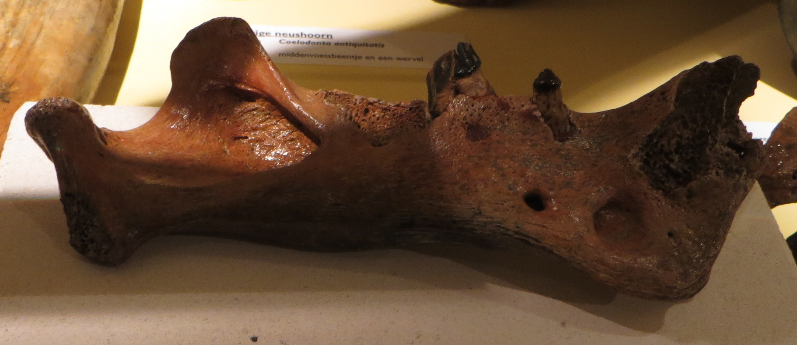 Fossil of Homotherium - Took the picture at Museum of Natural History, Rotterdam